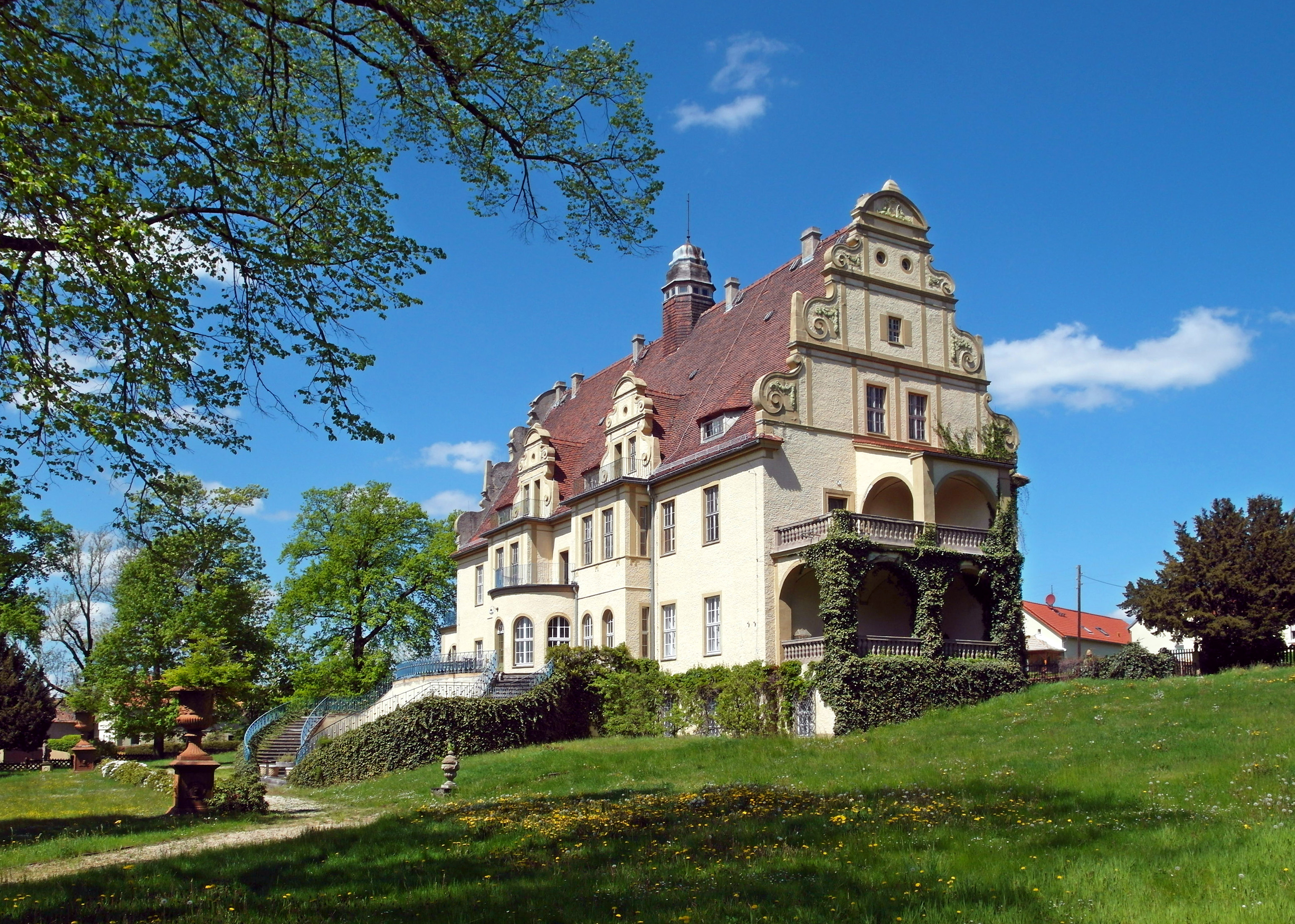 09.05.2016 01920 Weißig bei Kamenz (Gemeinde Oßling): Seit 1723 gehörte der Familie von Zehmen das Rittergut. Das heutige Schloß ließ sich Oskar von Zehmen für sich und seine Ehefrau Frida Auguste 1907/08 nach Plänen des Architekturbüros Lossow & Kühne aus Dresden errichten. Im II. WK war hier ein Wehrertüchtigungslager. In der DDR und danach noch bis 1993 wurde es als Kinderheim genutzt. Das riesige Schloß steht zum Verkauf. [SAM5794.JPG]20150509445DR.JPG(c)Blobelt Hornjoserbsce: W lětomaj 1907/08 natwarjeny hród we Wysokej pola Wóslinka.